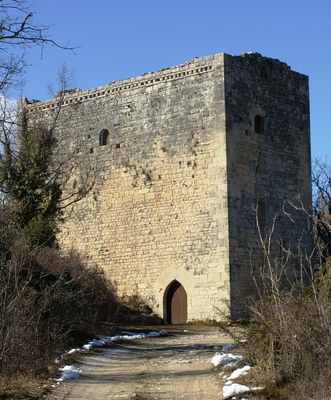 Vue de la tour de Porchères depuis le chemin d'accès